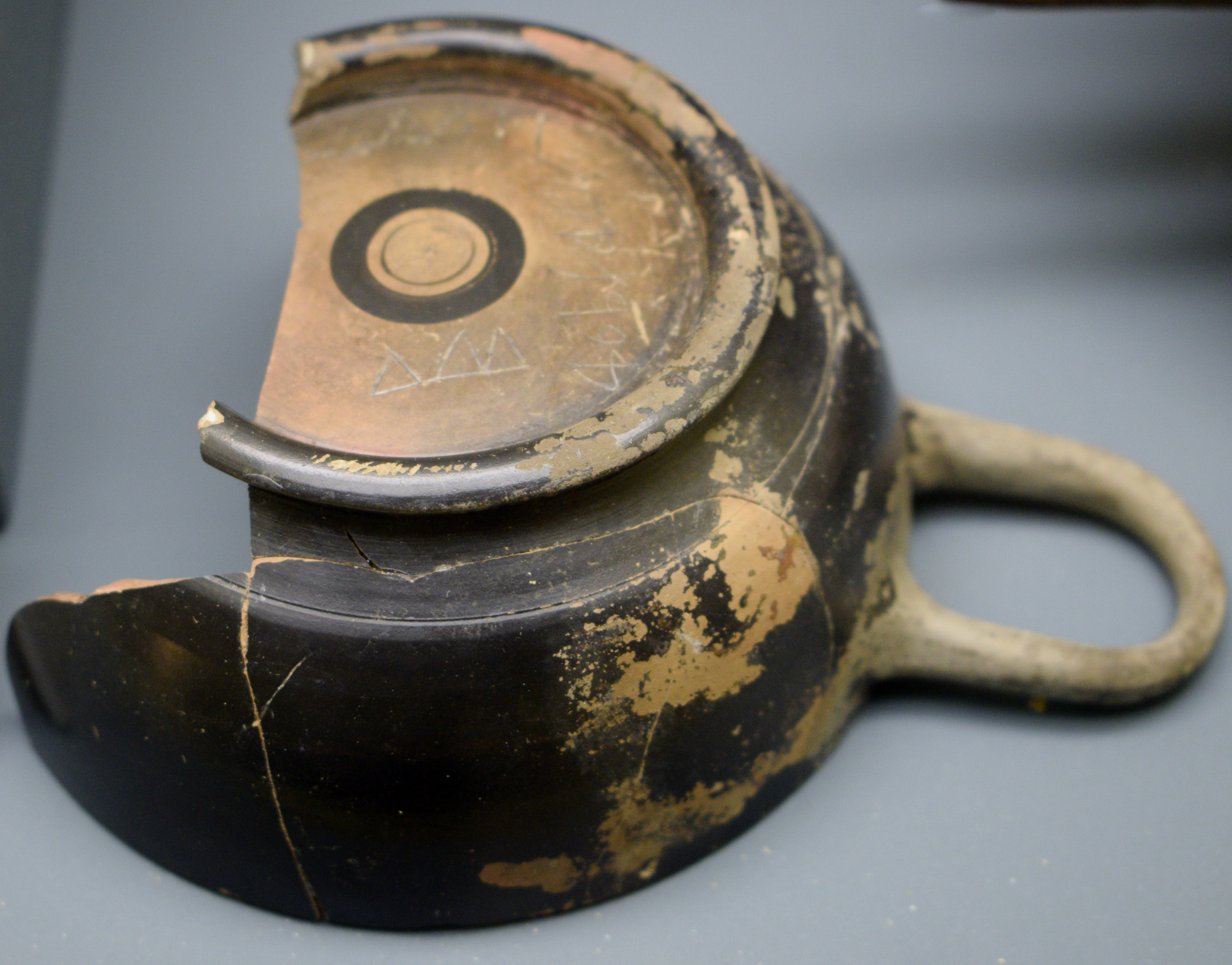 Museo de Albacete. Bolsal (s. IV a.C.)Proveniente de Pozo de la Nieve (Torreuchea, Hellín).Cerámica griega ática.Tiene inscritos numerales griegos y un nombre púnico.